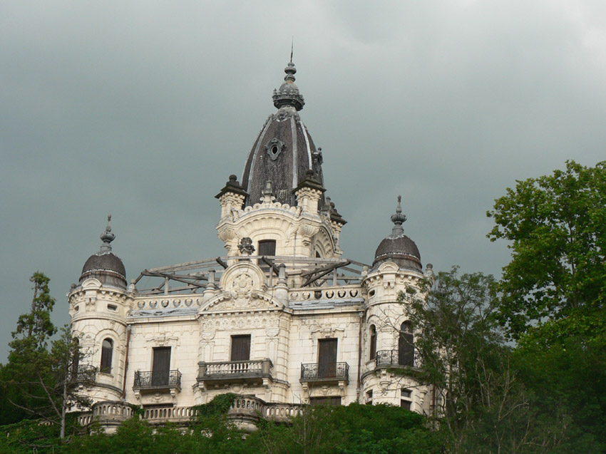 château de la Roche du Roi Aix les Bains (France)